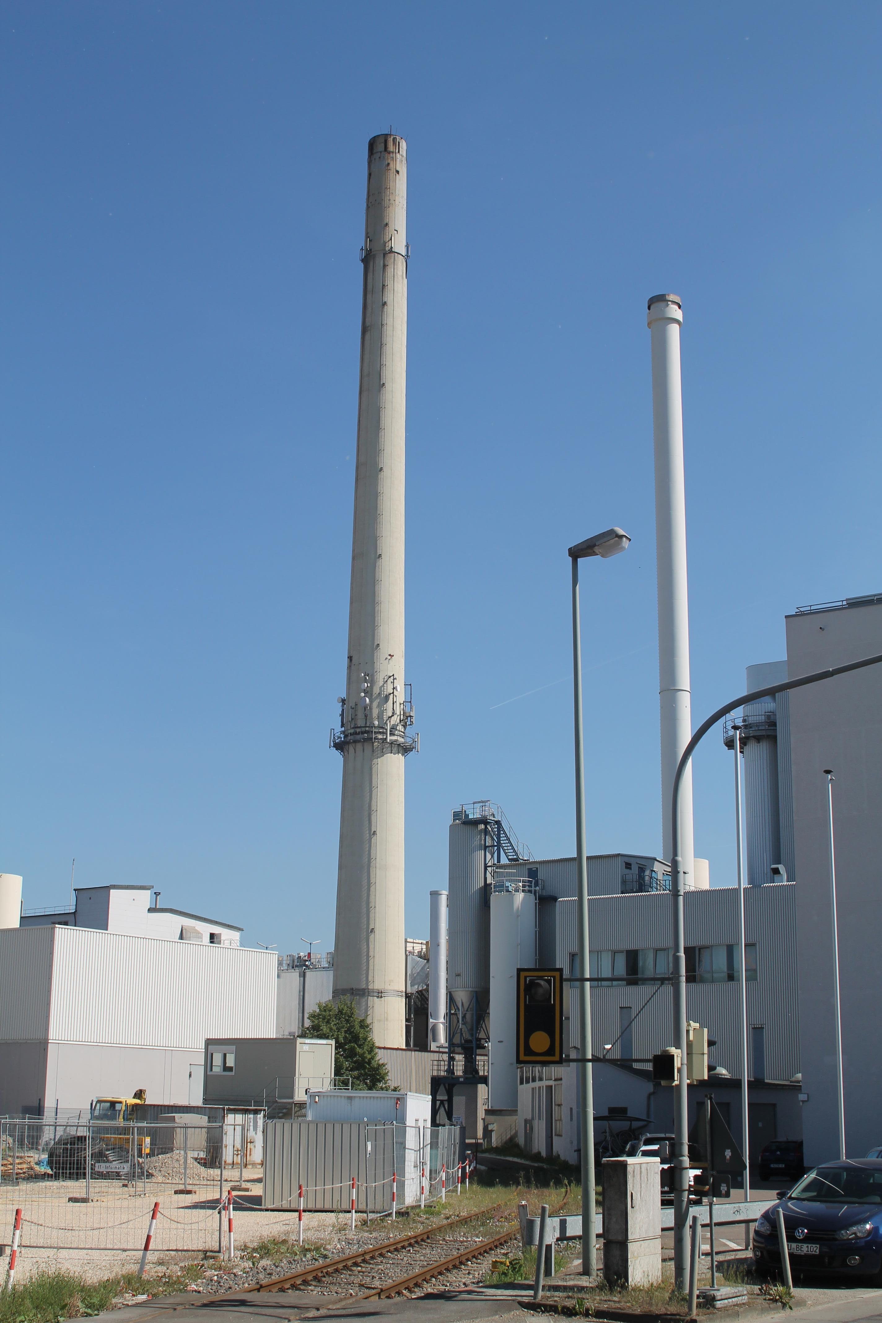 Heizkraftwerk Ulm